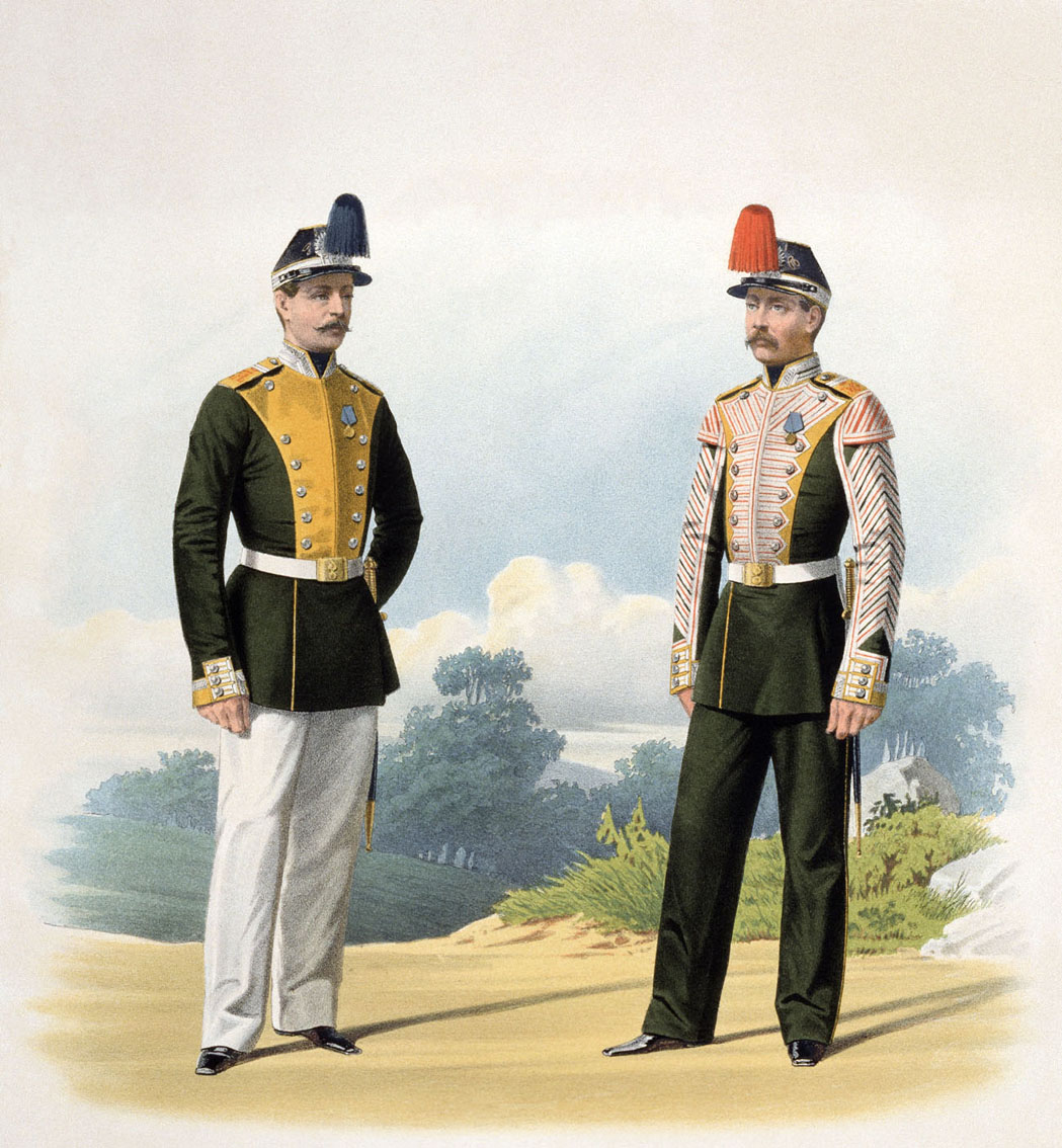 Унтер-офицер Кексгольмского Гренадерского Императора Австрийского и Музыкант С.-Петербургского Гренадерского Короля Фридриха Вильгельма III полков. 22 августа 1862. (в воскресной форме).